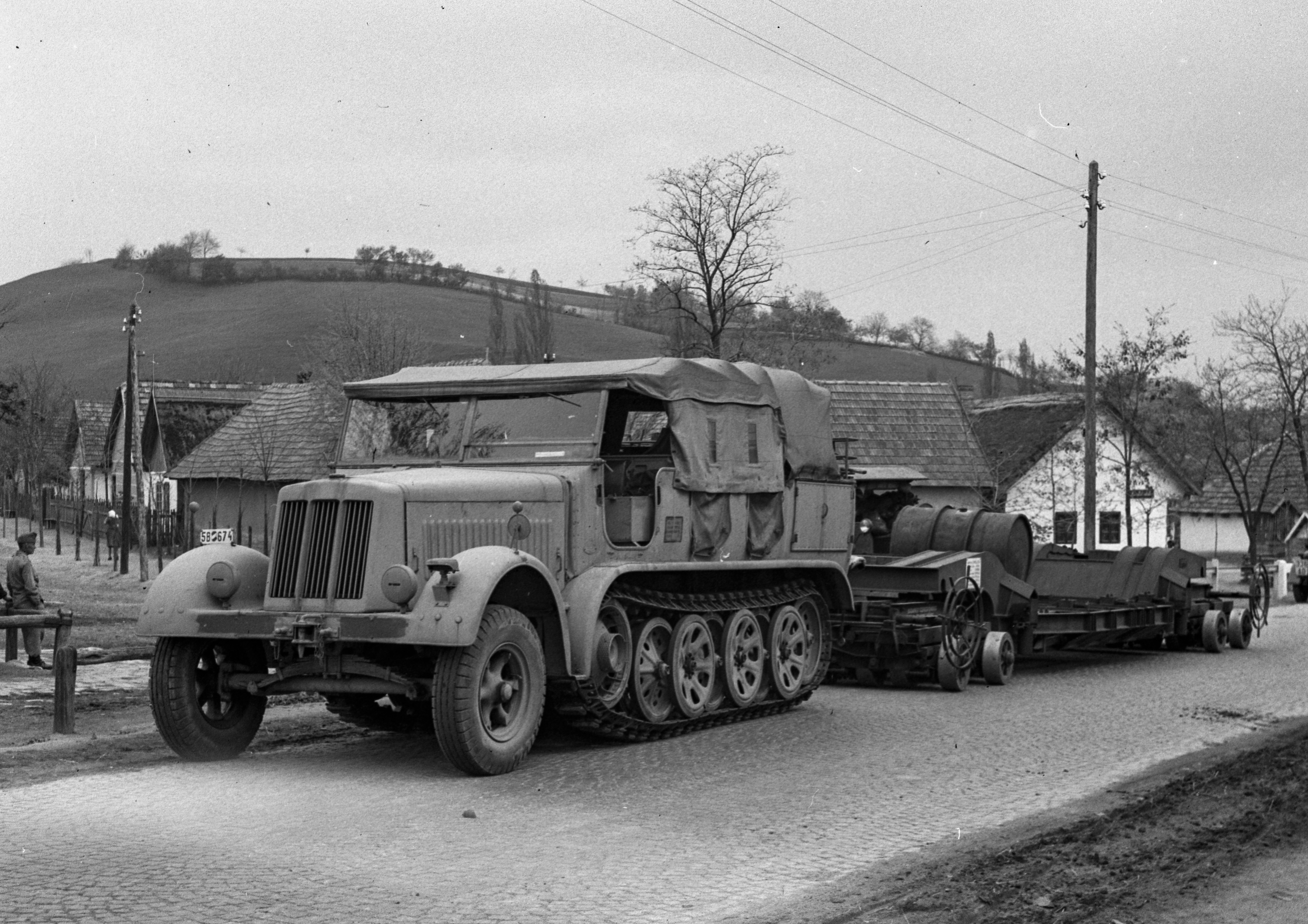 Szabadság út (a 3-as főút városi szakasza), balra a Madarász János utca torkolata. Location: Hungary Tags: Gerrman brand, automobile, Special-motorized-vehicle 2, track, tow truck, combat vehicle, military Title: Szabadság út (a 3-as főút városi szakasza), balra a Madarász János utca torkolata.